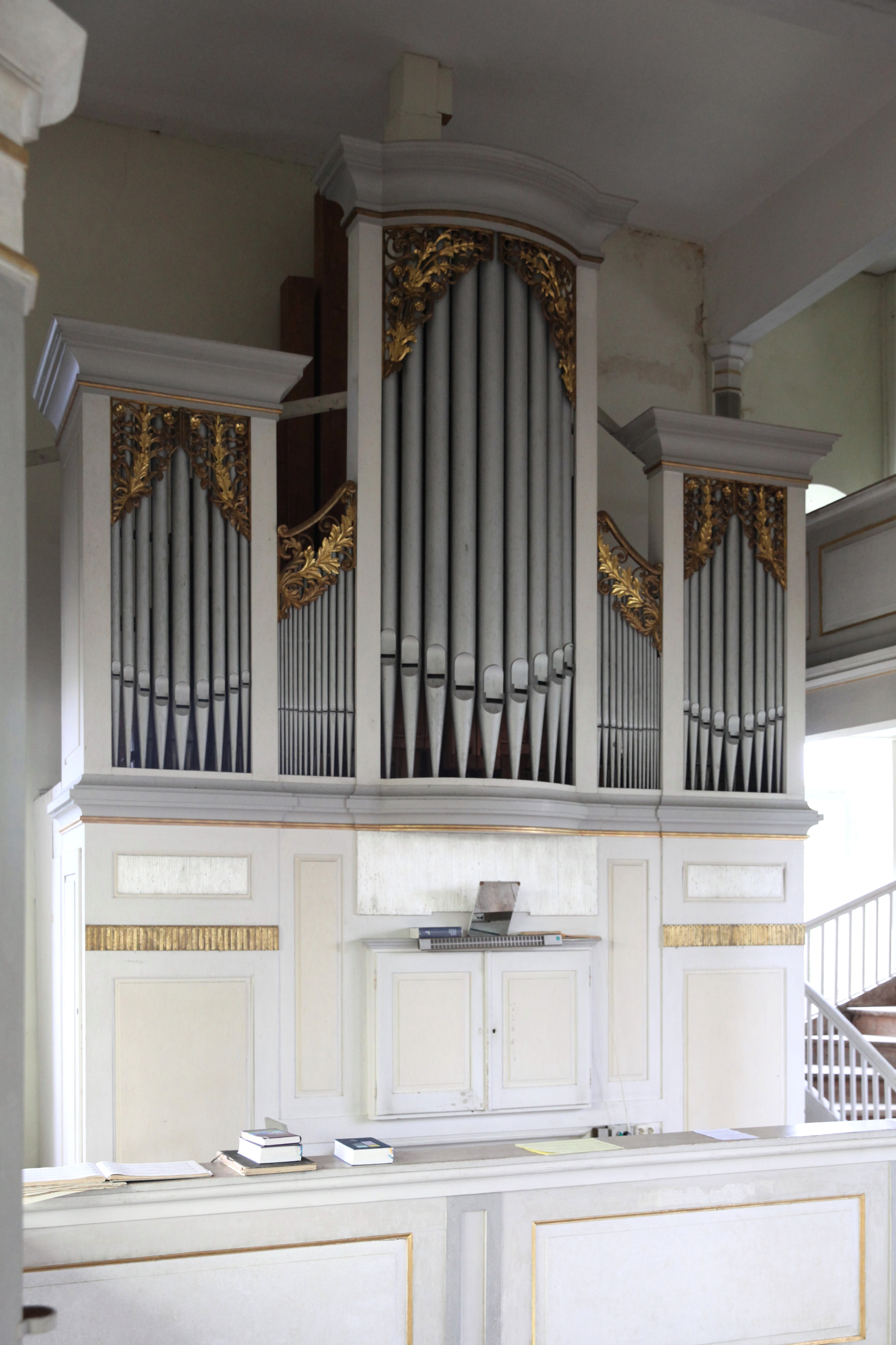 St. Bonifatius in Ahlstadt